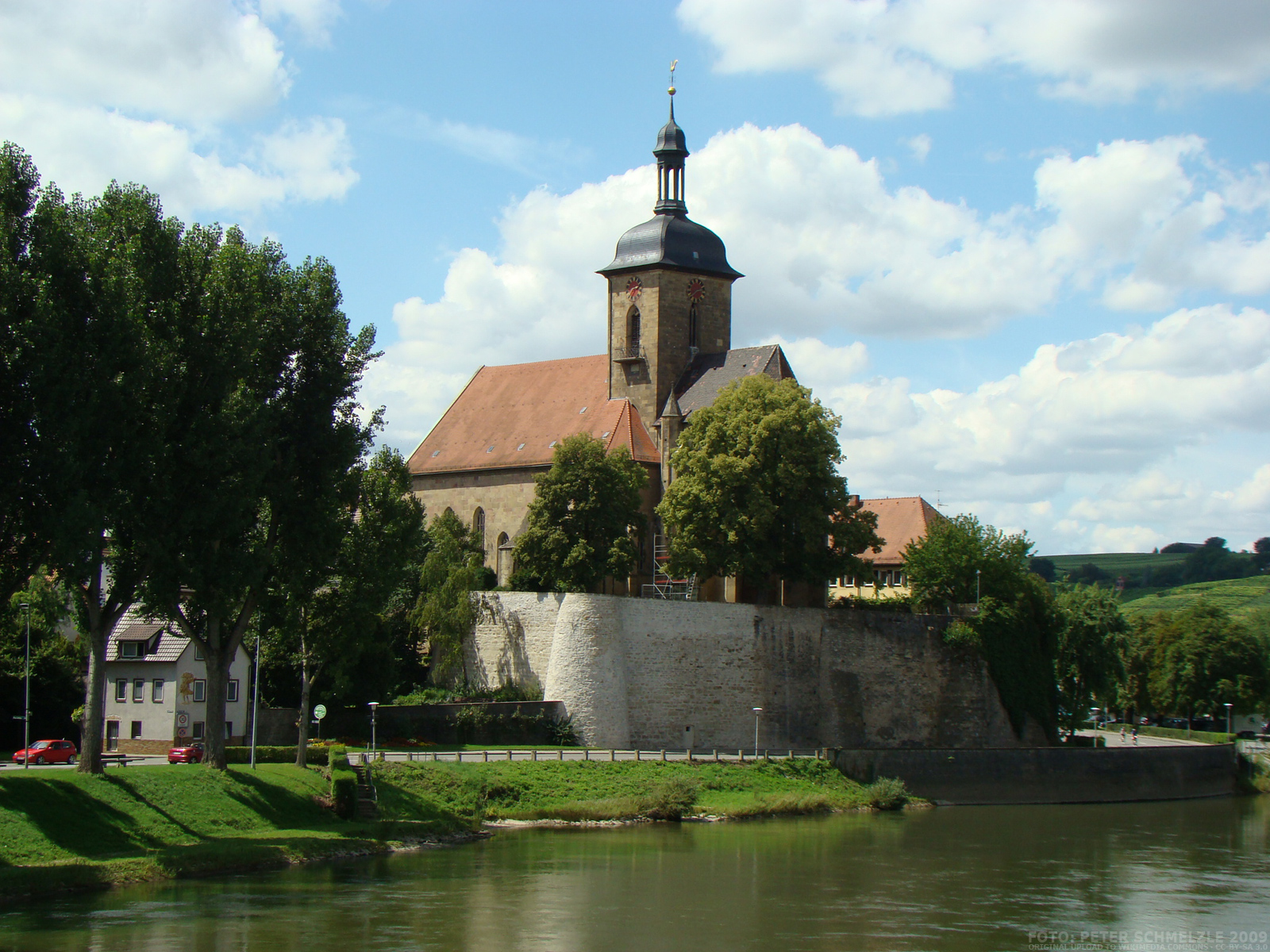 Regiswindiskirche in Lauffen am Neckar